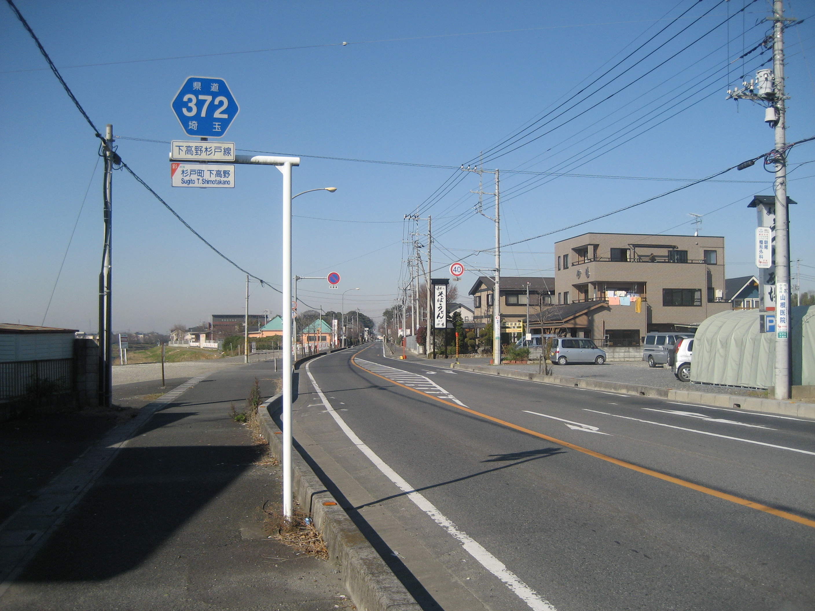 埼玉県道372号線杉戸町内